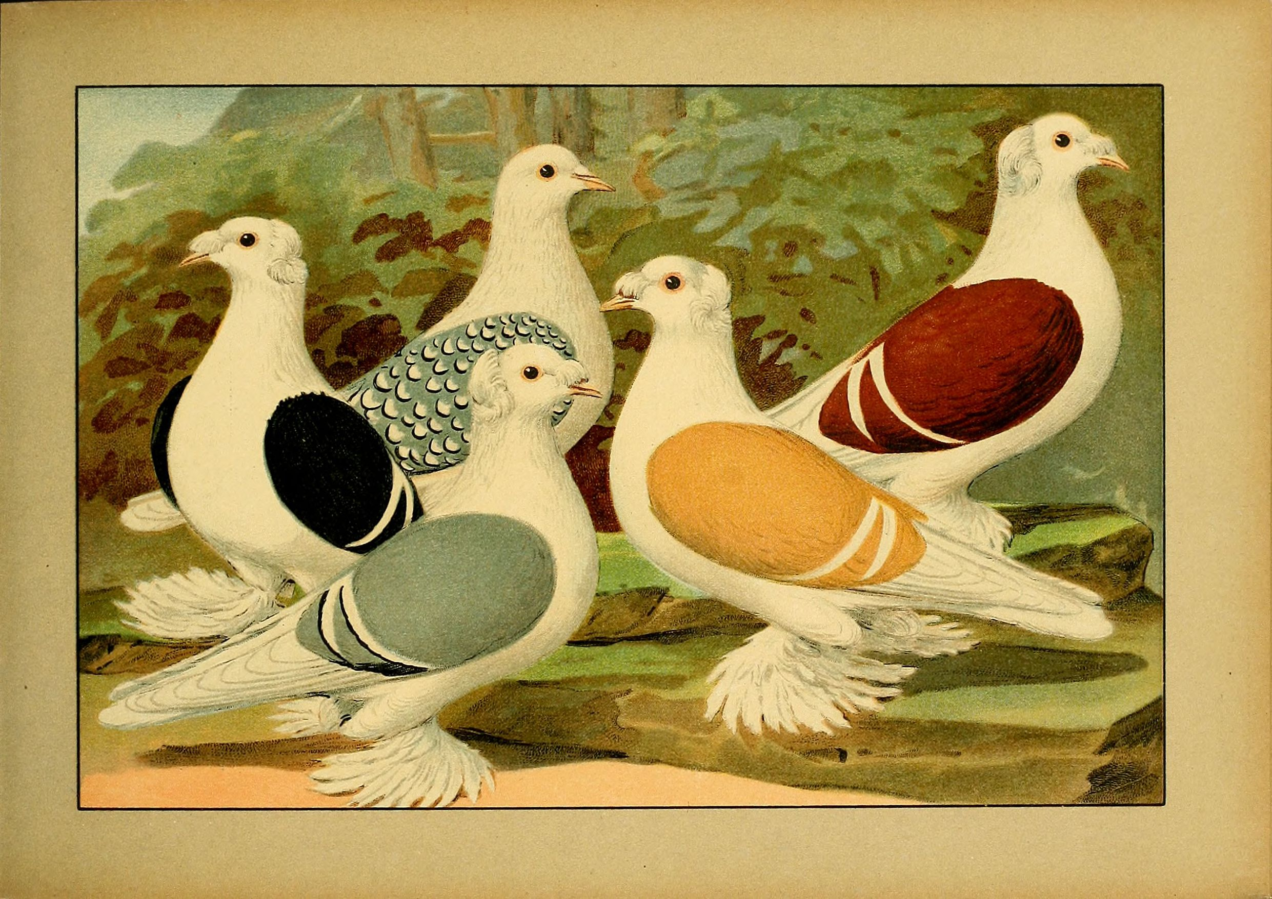 Deutsch